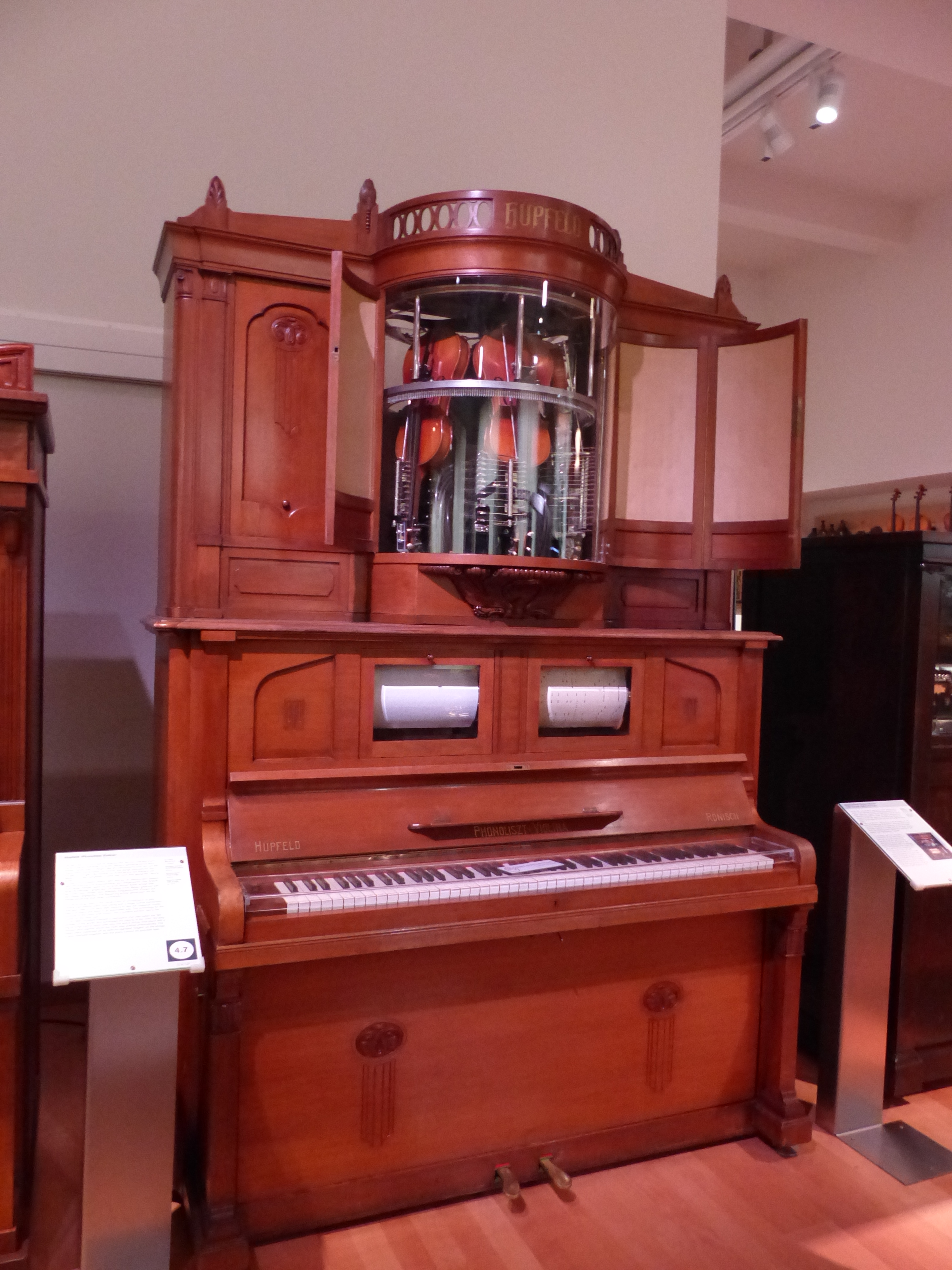 Hupfeld "Phonoliszt Violina", ca. 1914, Leipzig; Exponat im Technischen Museum Wien